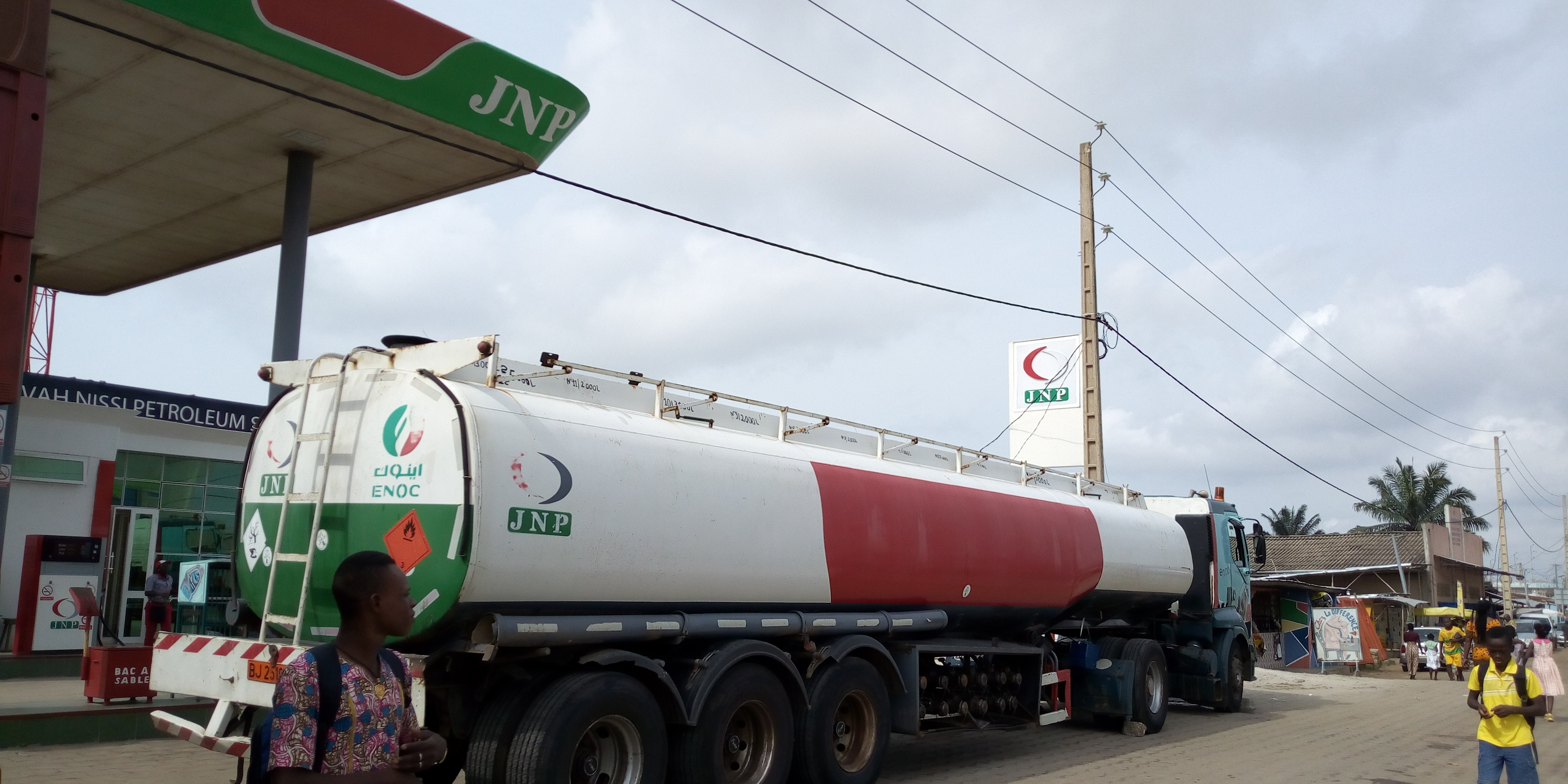 Citerne JNP d'import de carburant à la station JNP au carrefour de la pharmacie la concorde de cocotomey This is an image with the theme "Africa on the Move or Transport" from: Benin